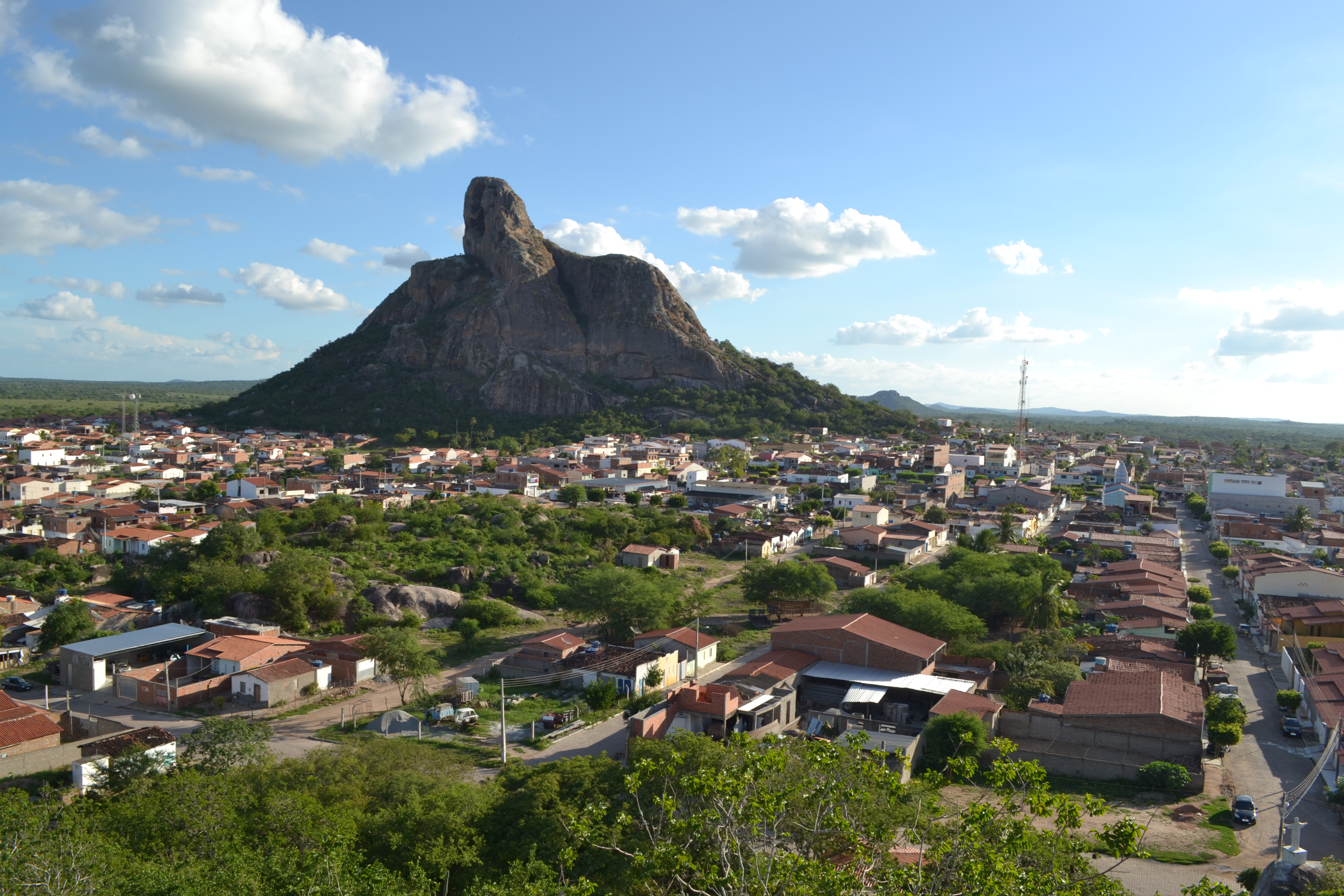 uma serra e diversas casas em volta